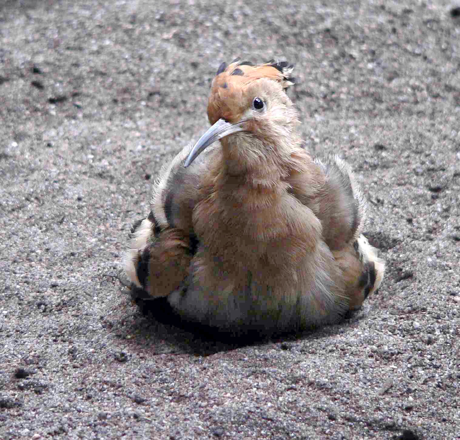 Wiedehopf, Upupa epops